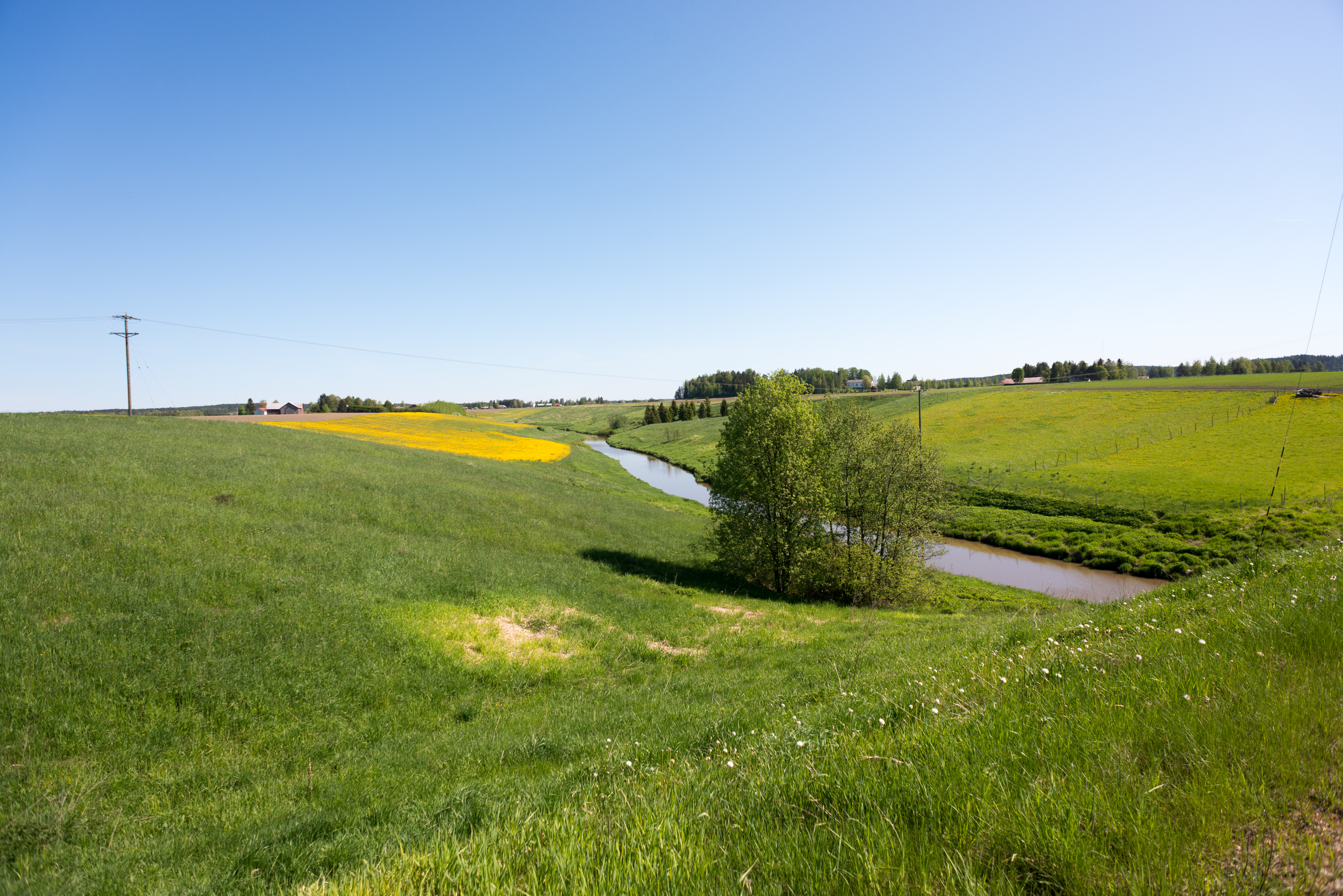 Uskelanjoki Perttelissä